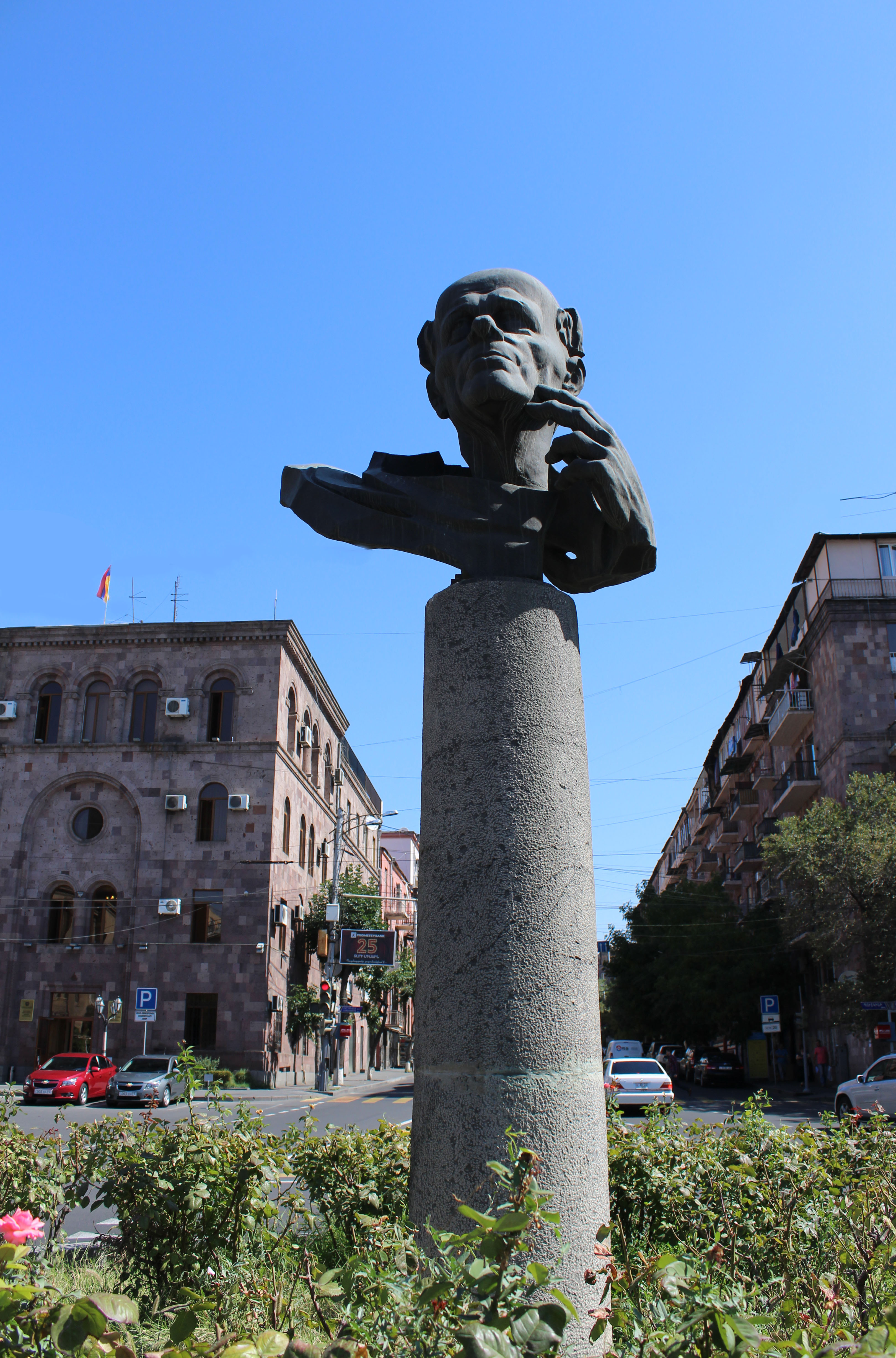 Անդրեյ Սախարովի հուշարձանը Երևանի համանուն հրապարակում։ 6/102.3